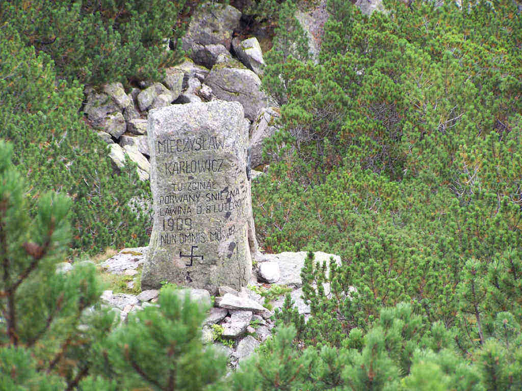 Kamień Karłowicza (Tatra Mountains, Kościelec)